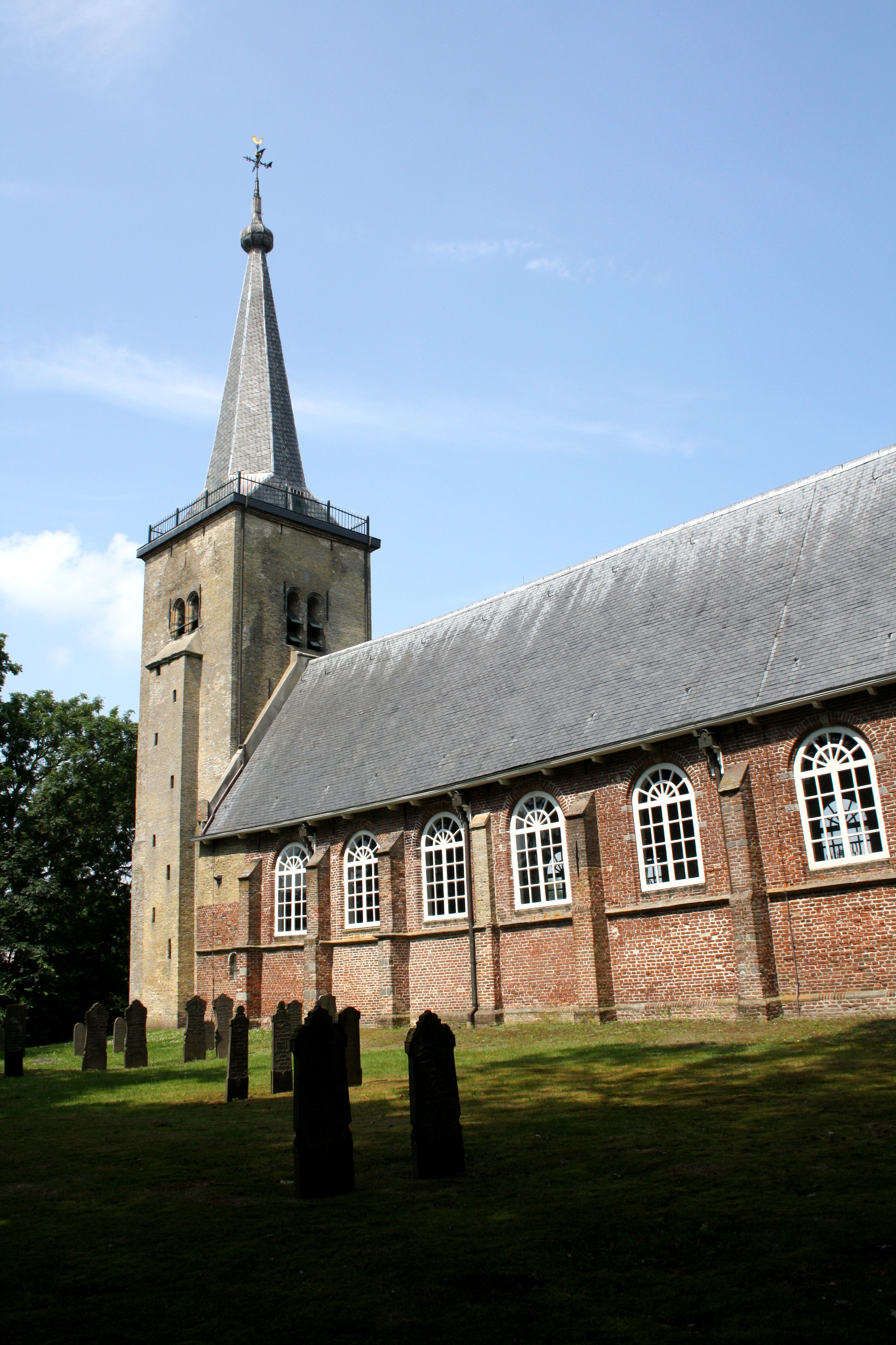 Weststellingwerf - Oldeholtpade - Stephanuskerk - anno 1545